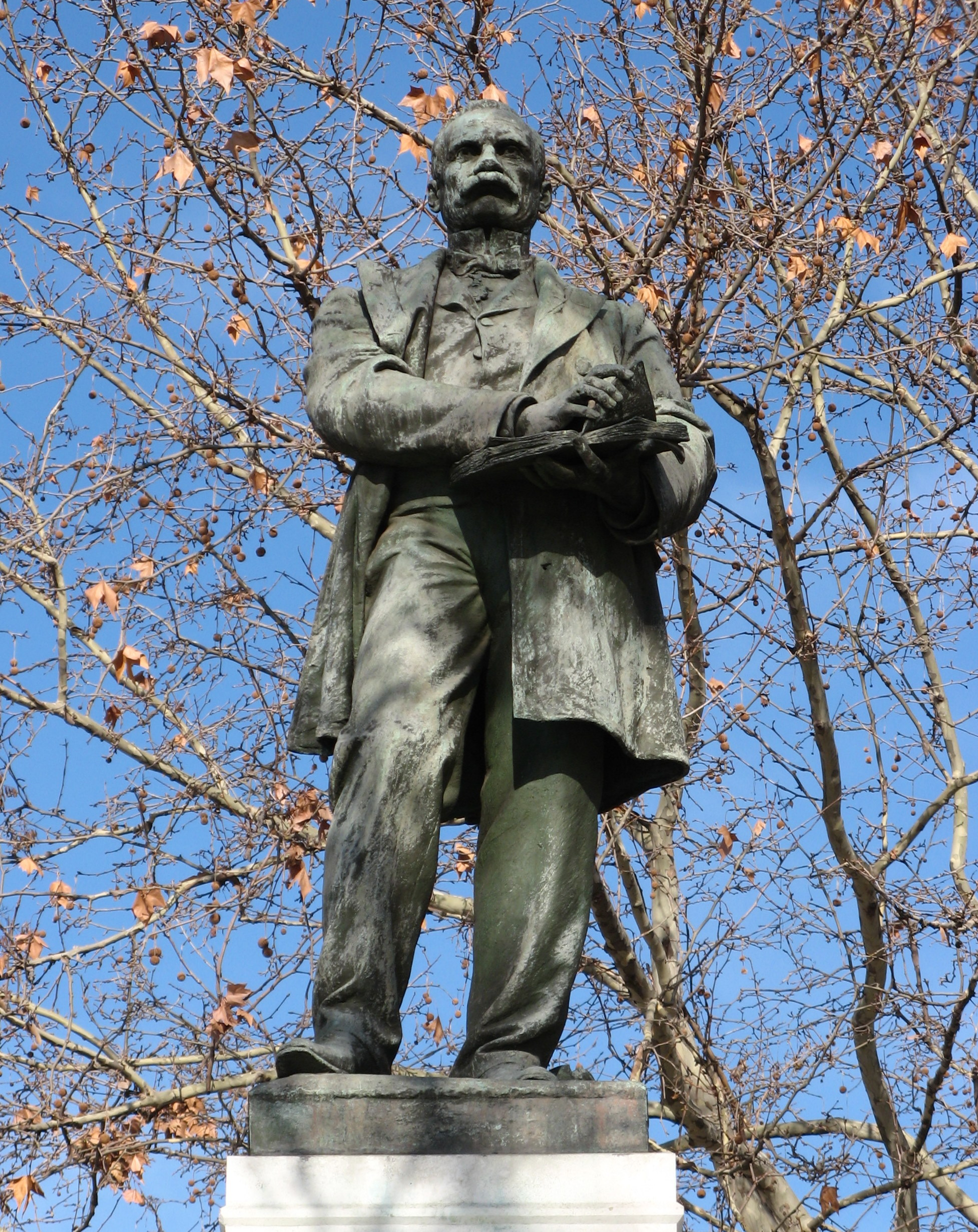 CLAUDIO MOYANO 1809 1890 AL EXMO SEÑOR D CLAUDIO MOYANO SAMANIEGO POR GRANDES SERVICIOS PRESTADOS A LA INSTRUCCION PUBLICA EL PROFESORADO ESPAÑOL AÑO 1900 ESTE MONUMENTO SE ERIGIO EN ESTE LUGAR EN 1899 FUE POSTERIORMENTE TRASLADADO, RESTITUYENDOLO EL AYUNTAMIENTO DE MADRID A SU PRIMITIVO EMPLAZAMIENTO CON OCASION DE CONMEMORARSE EL CXXV ANIVERSARIO DE LA PROMULGACION DE LA LEY DE INSTRUCCION PUBLICA DE 22 DE JULIO DE 1857, QUE TUVO EN EL INSIGNE CATEDRATICO Y POLITICO D. CLAUDIO MOYANO SAMANIEGO SU PRIMER INSPIRADOR Y SU MAS PRECLARO IMPULSOR Y ARTIFICE 28 DE MARZO DE 1982 SIENDO ALCALDE DE LA VILLA D. ENRIQUE TIERNO GALVAN Escultura de Claudio Moyano Cuesta de Moyano Madrid Comuniad de Madrid España